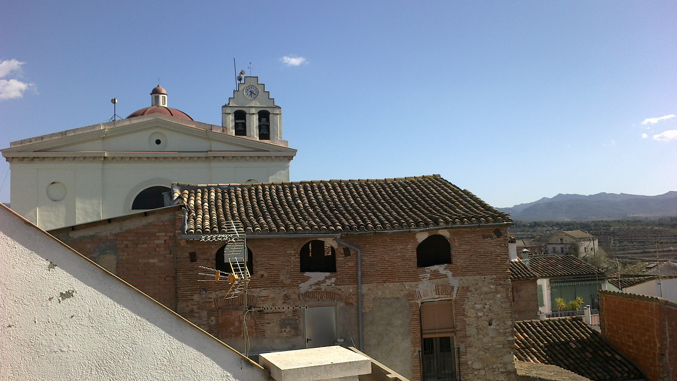 Campanar de l´esglèsia de Sant Bartomeu, al Masroig, Priorat